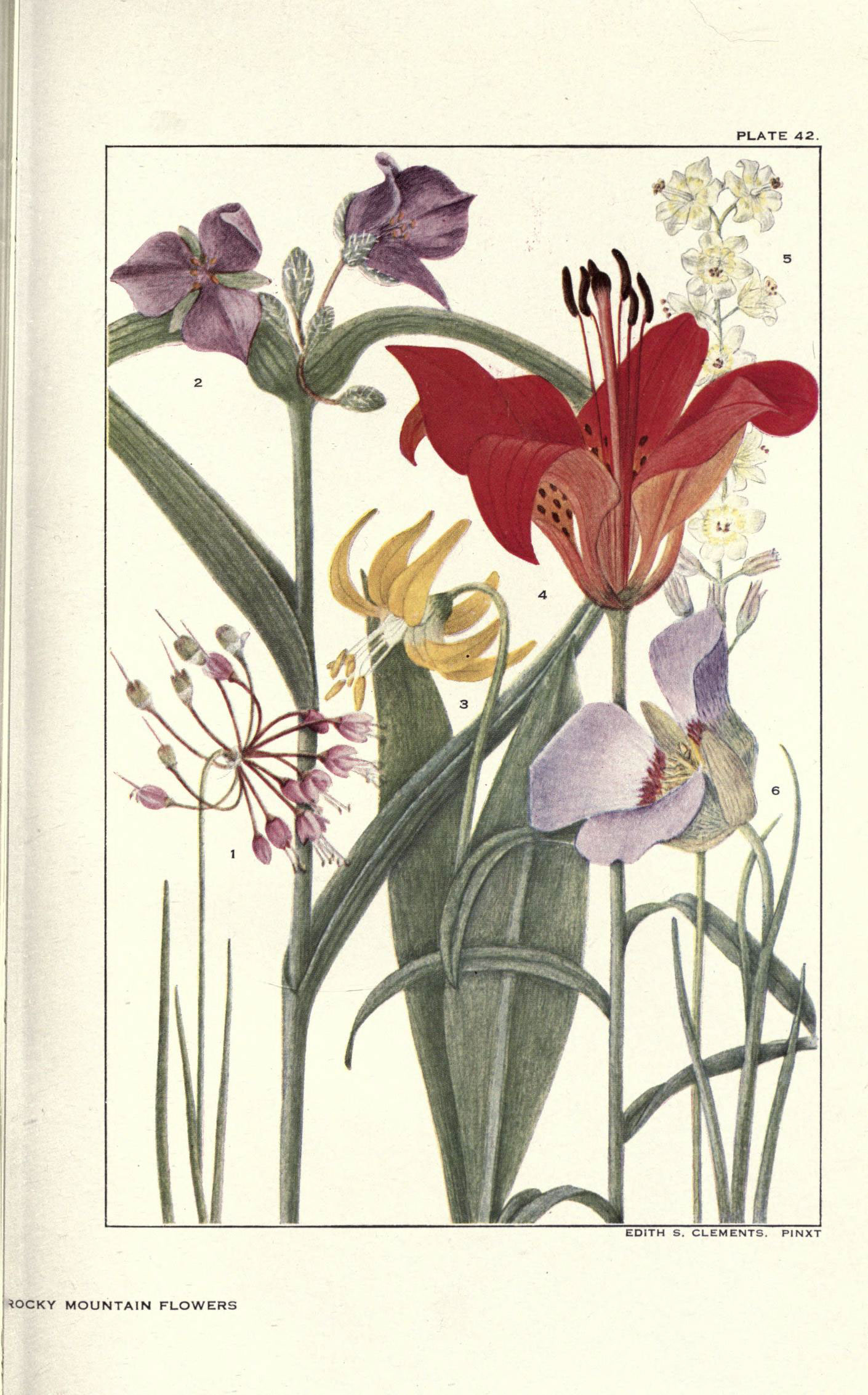 PLATE 42. Allium cernuum Tradescantia virginiana Erythronium parviflorum = Erythronium grandiflorum Lilium philadelphicum Zigadenus elegans = Anticlea elegans Calochortus gunnisonii